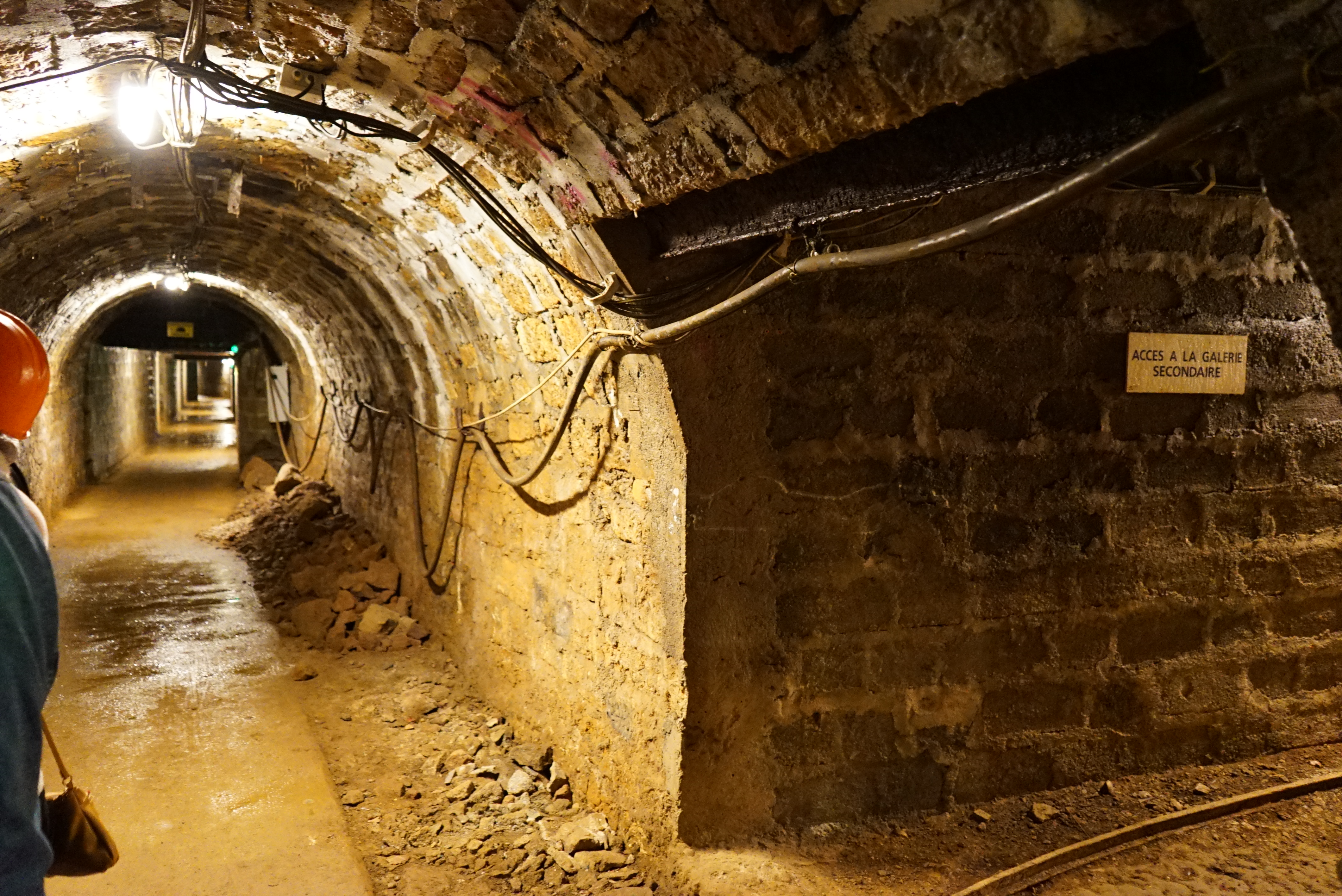 intérieur de la mine ouverte en 1874 le conduit est maçonné.